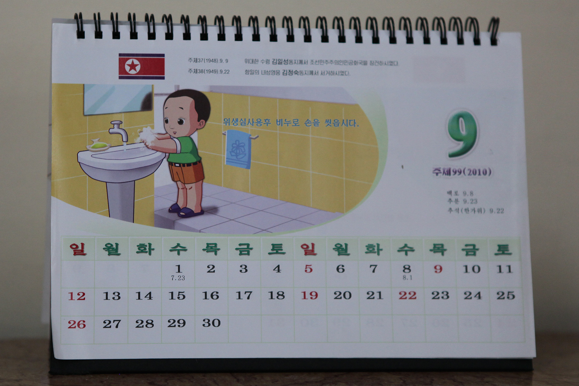 Calendar in Maternity hospital, Pyongyang.